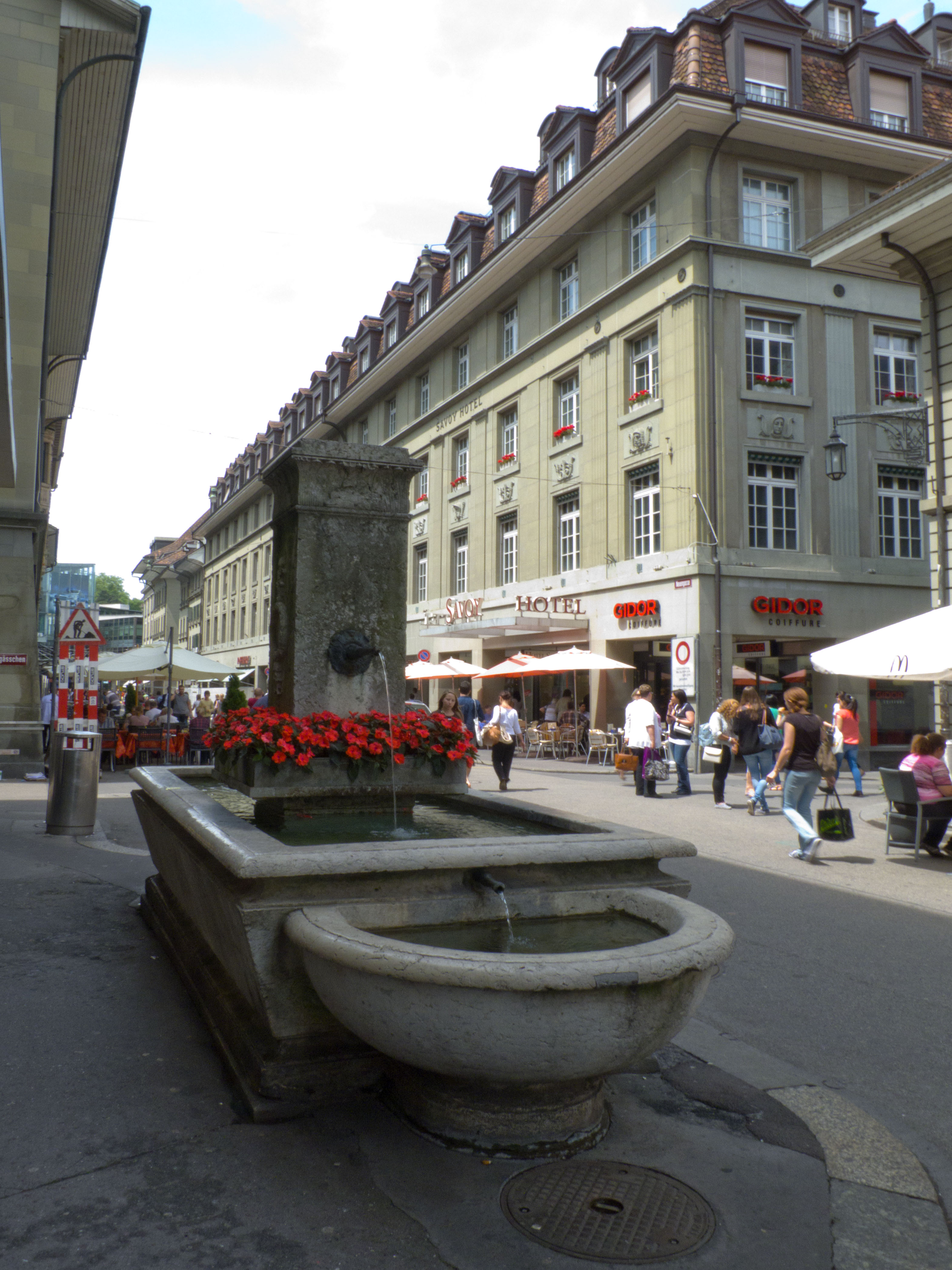 Der mittlere Neuengassbrunnen, der einzig verbliebene Brunnen.